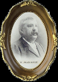 Portrait du graveur jules Huyot (1841-1921)